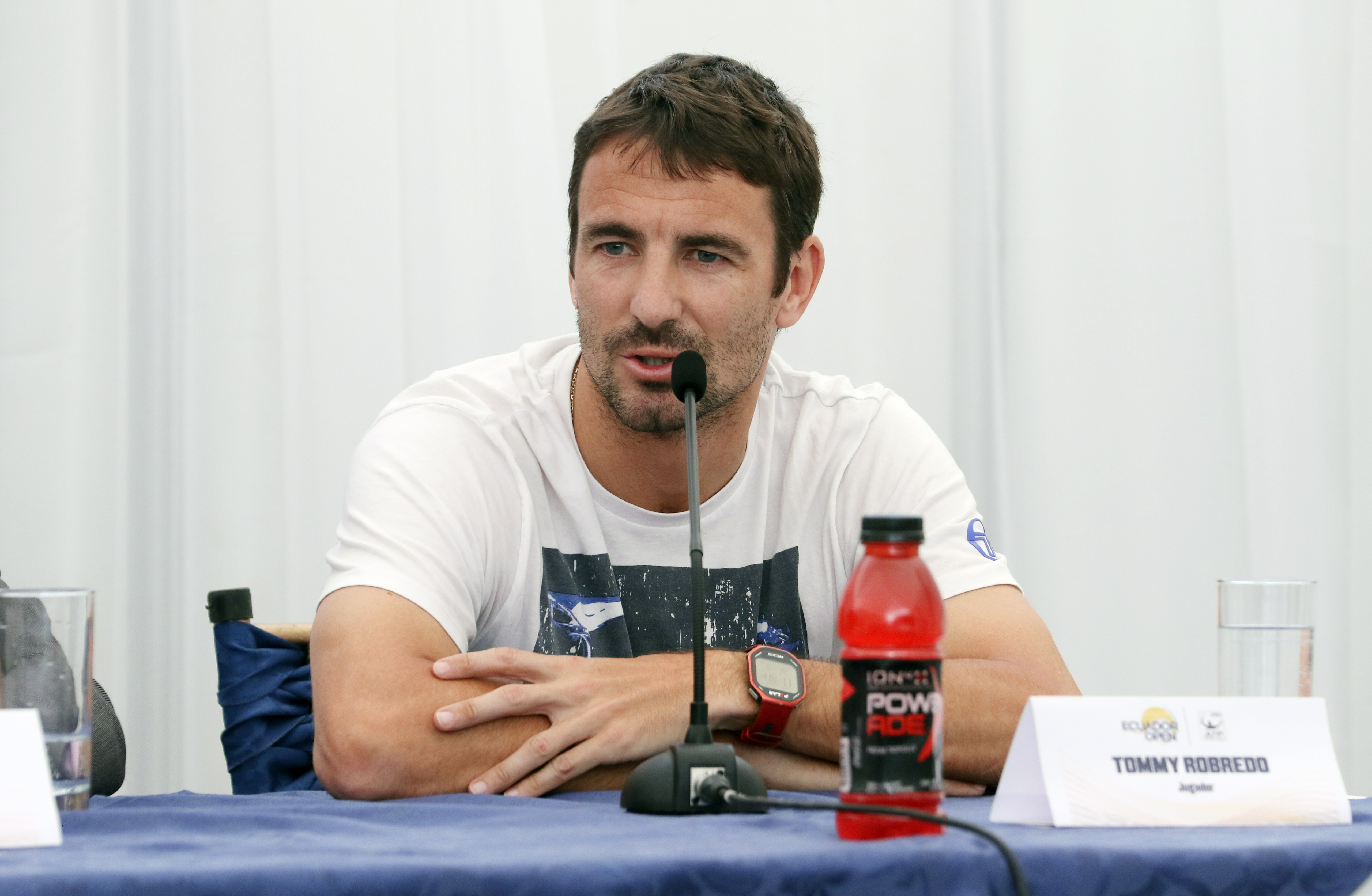 Quito, 02 de febrero de 2018 (Andes).- Un año más de vida celebra el ATP 250 Ecuador Open. En la cuarta edición ondean banderas de 14 países cuyos representantes luchan por el título y, de manera simbólica, por el trofeo del General Rumiñahui, obra del maestro Oswaldo Guayasamín. En la gráfica el español Tommy Robredo, jugador. ANDES/Micaela Ayala V.